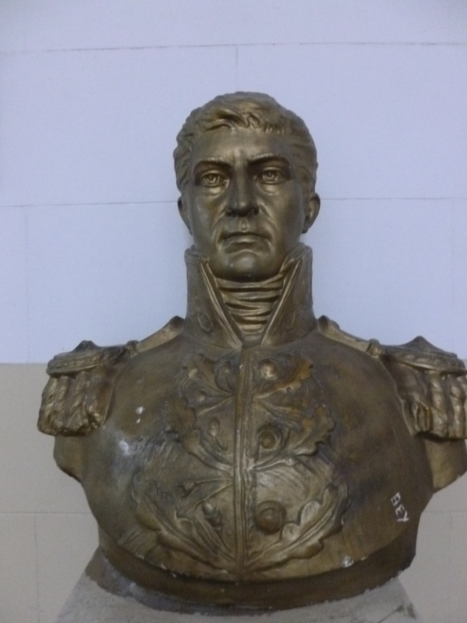 Escuela N.º 67 Juan E. Pestalozzi (Mendoza 3967, Rosario, Argentina). Busto del general Dr. Manuel Belgrano, cemento patinado bronce brillante, a 16 dm, interior, en lateral derecho del vestíbulo central.